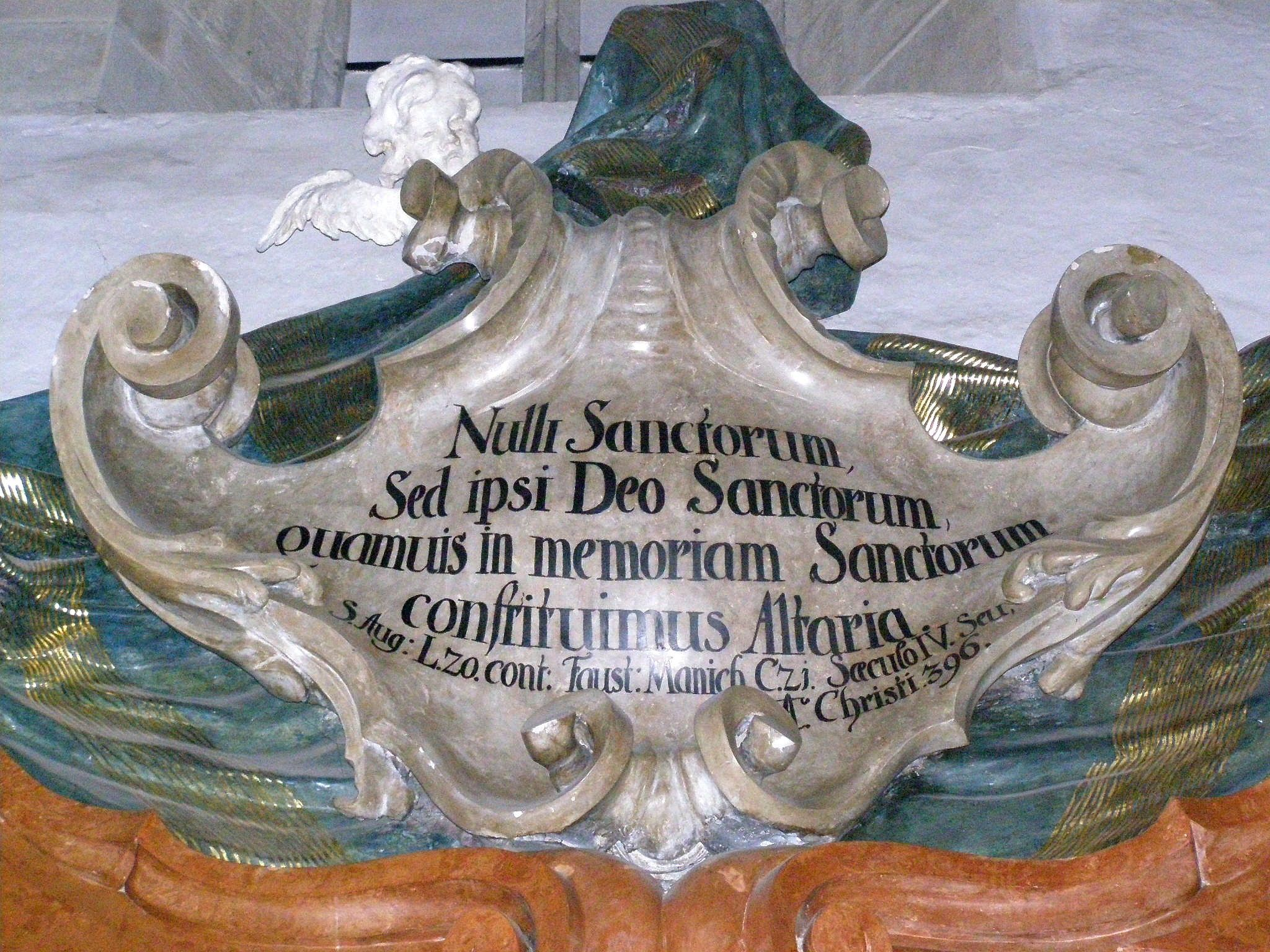 Volútová kartuša nad portálom kaplnky svätého Jána Almužníka obsahuje citát z 21. kapitoly spisu svätého Augustína Contra Faustum Manichaeum (Proti manichejcovi Faustovi) z rokov 396 - 398